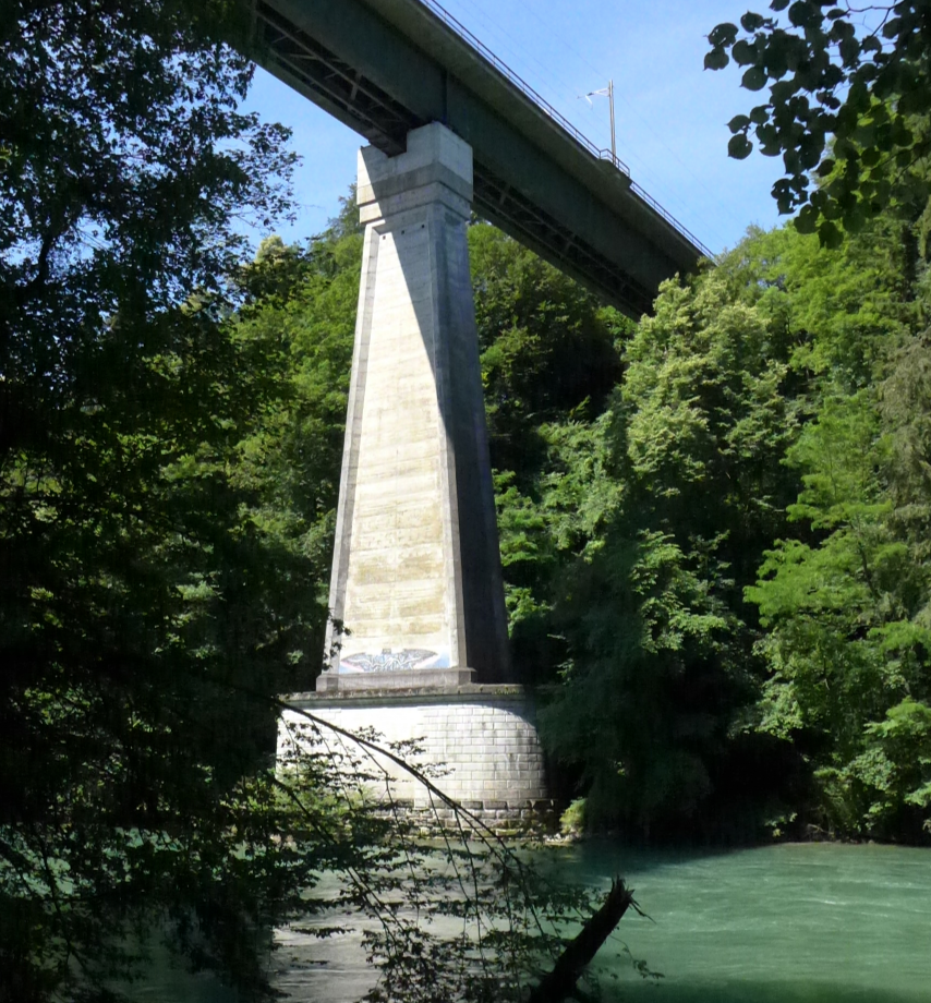 Reussbrücke bei Mellingen